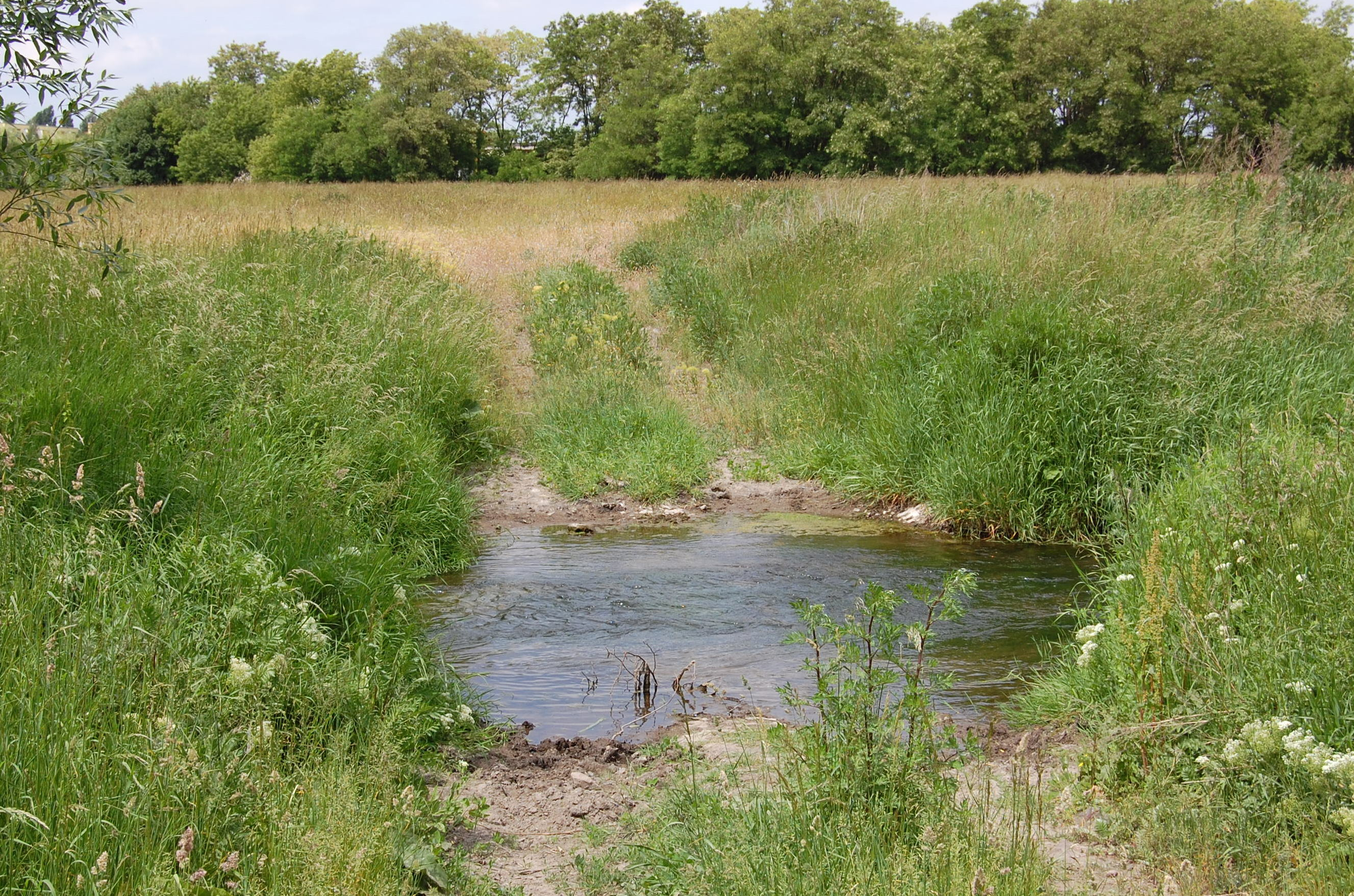 Furt durch die Sülze nahe ihrer Mündung in die Elbe